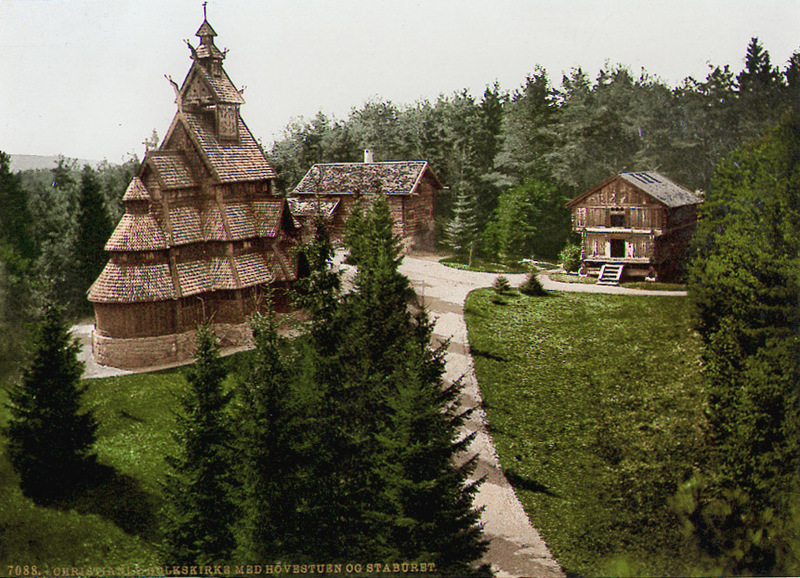 Norsk Folkemuseum, friluftsmuseum, Gol stavkirke, Hovestuen, stabbur.